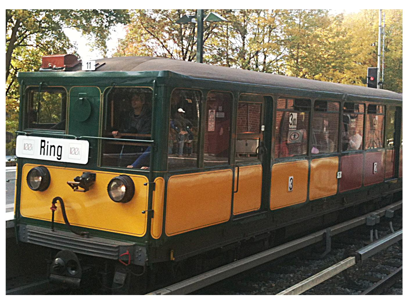 Museumswagen 11 der Hamburger Hochbahn AG (HHA)